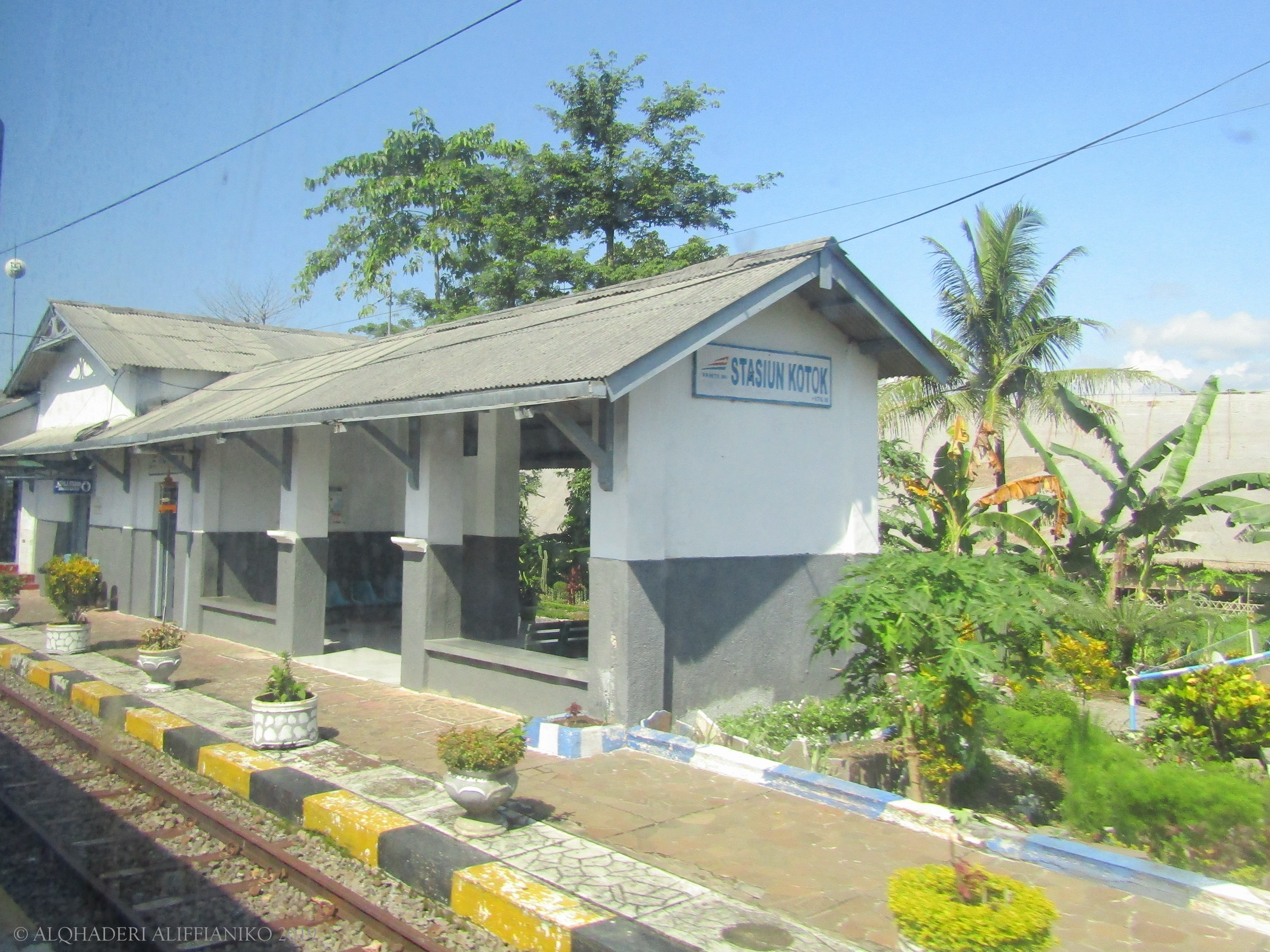 Stasiun Kotok, dilihat dari peron